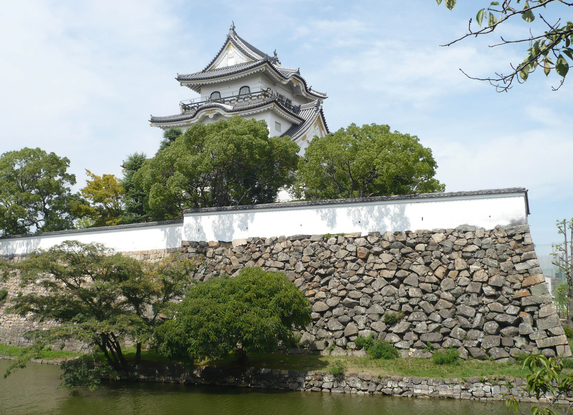 岸和田城の天守と犬走り